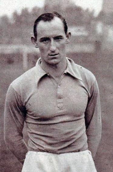 Émile Veinante en octobre 1937.